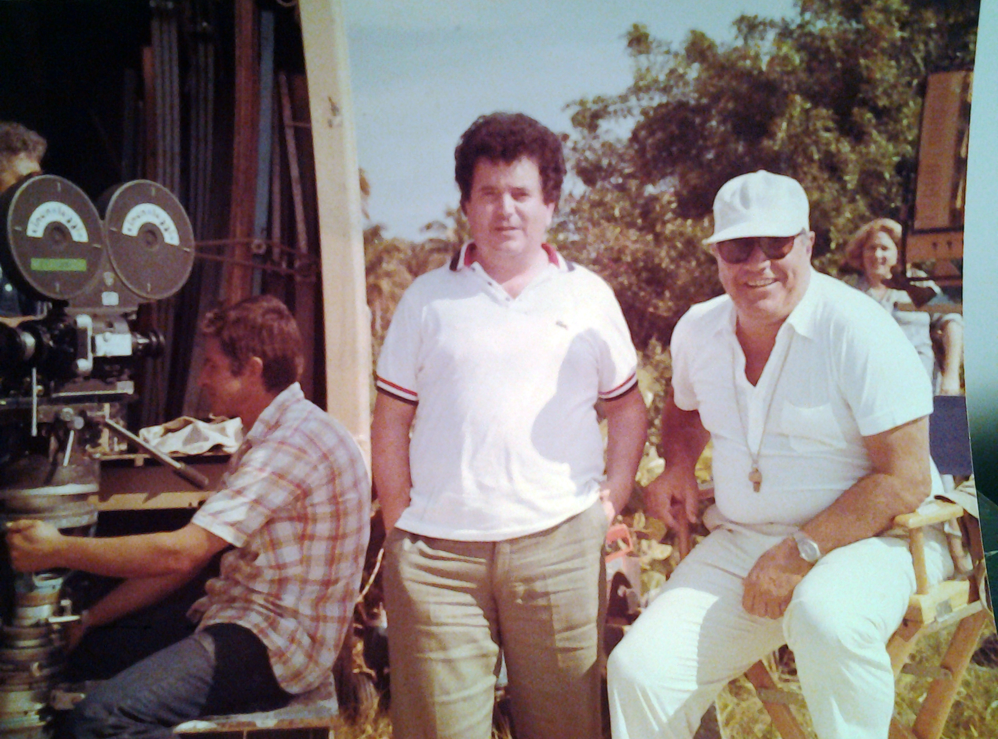 Io e Sergio